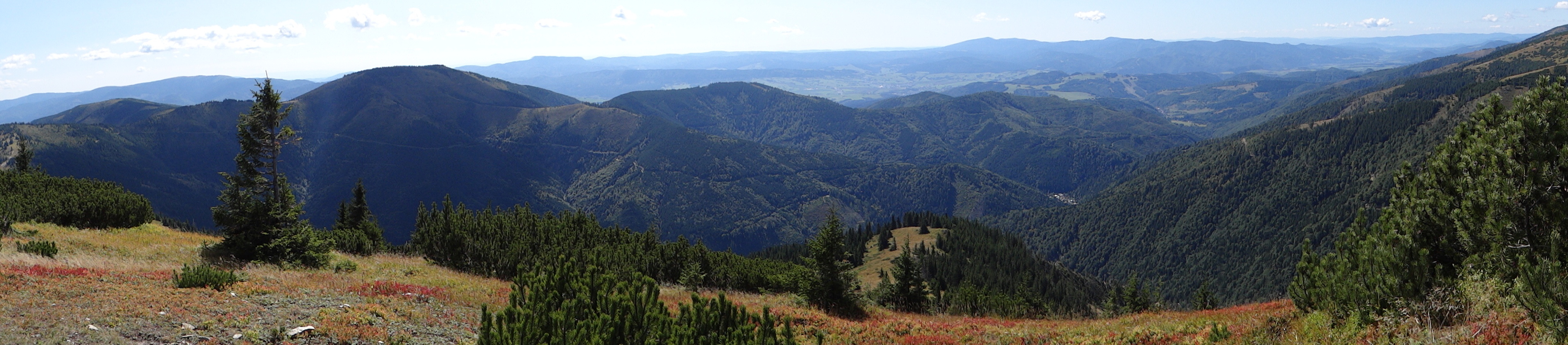 Štiavnicka (valley)